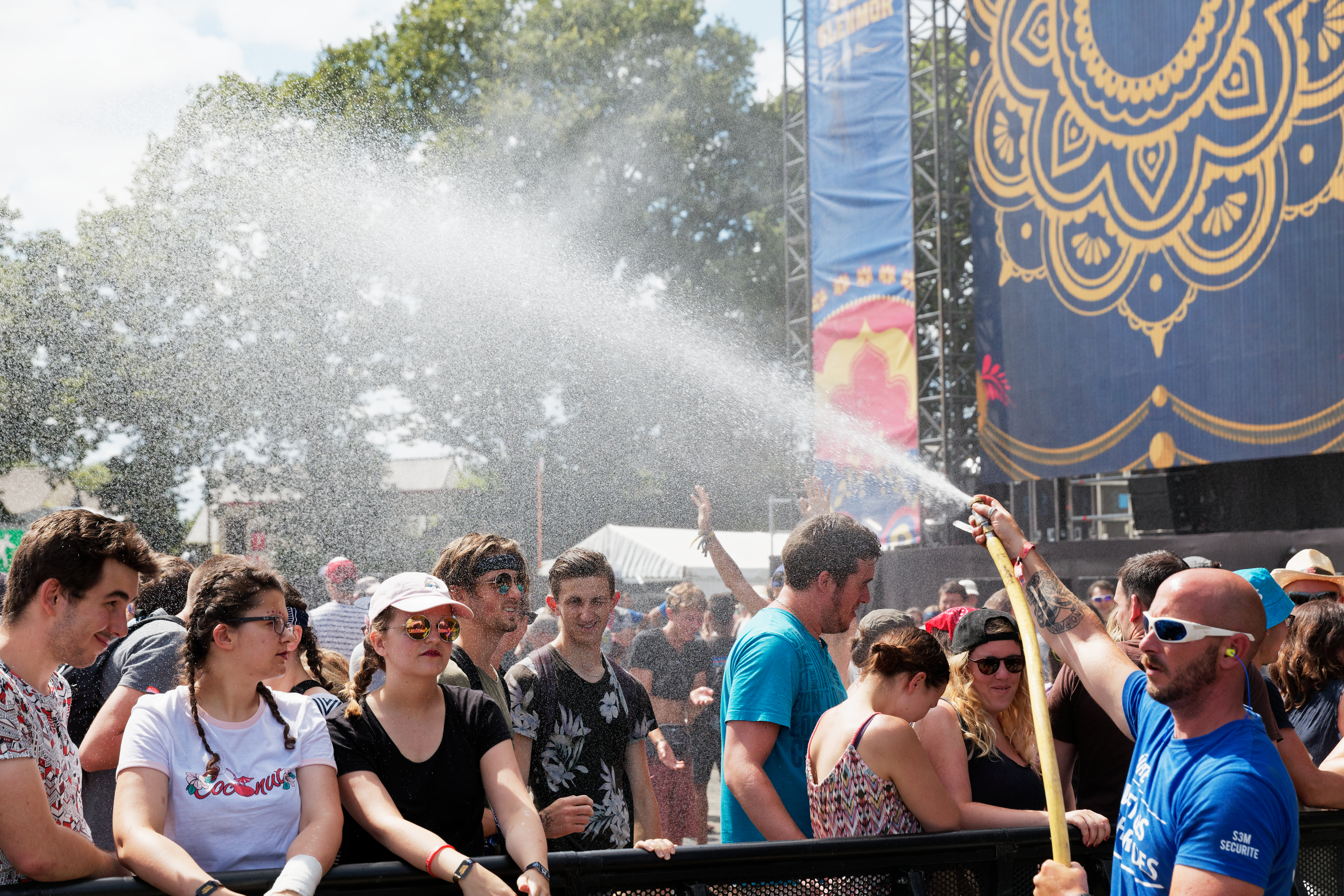 Oscar and the Wolf en concert lors du festival des vieilles charrues 2018.